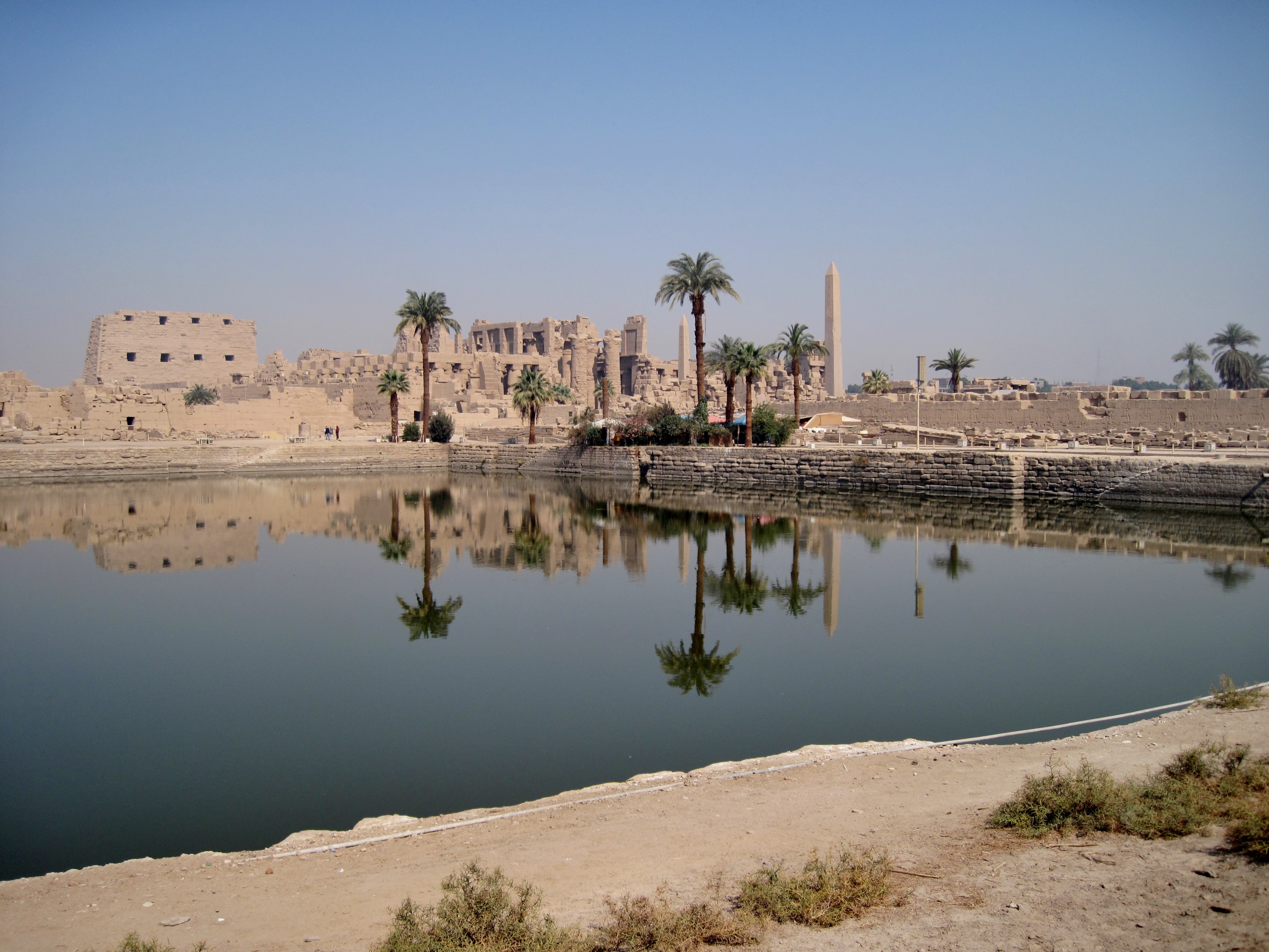 Heiliger See im Tempel von Karnak, nördlich von Luxor, Ägypten